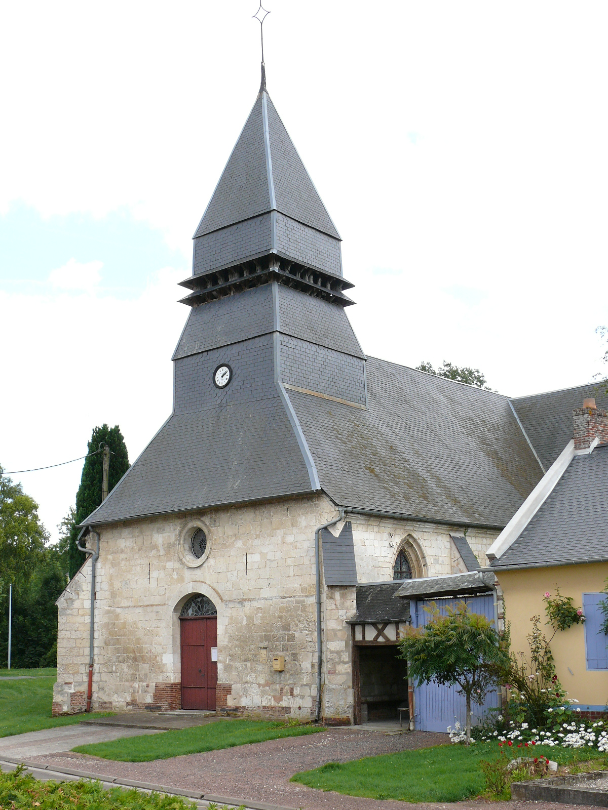 Thoix : l'église Saint-Etienne